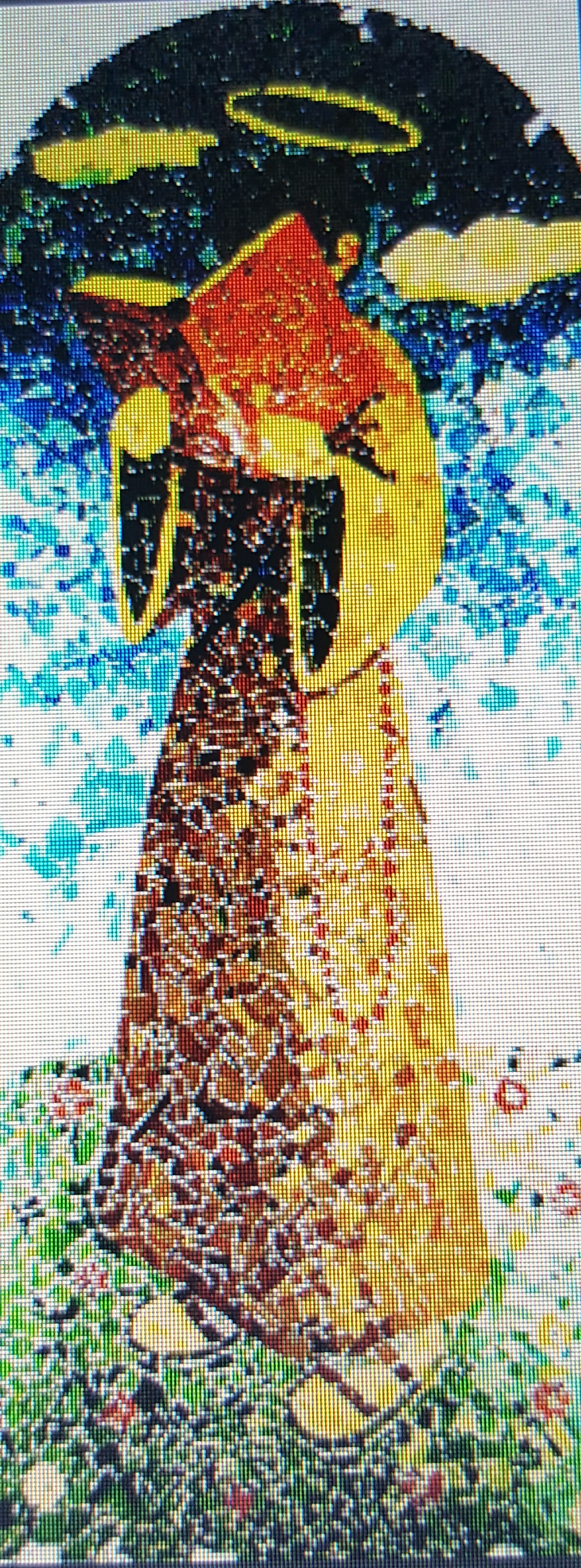 mosaico